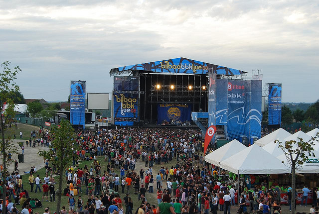 Escenario de Bilbao BBK live 2008.